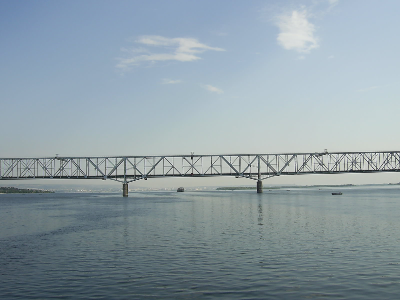 Увекский железнодорожный мост